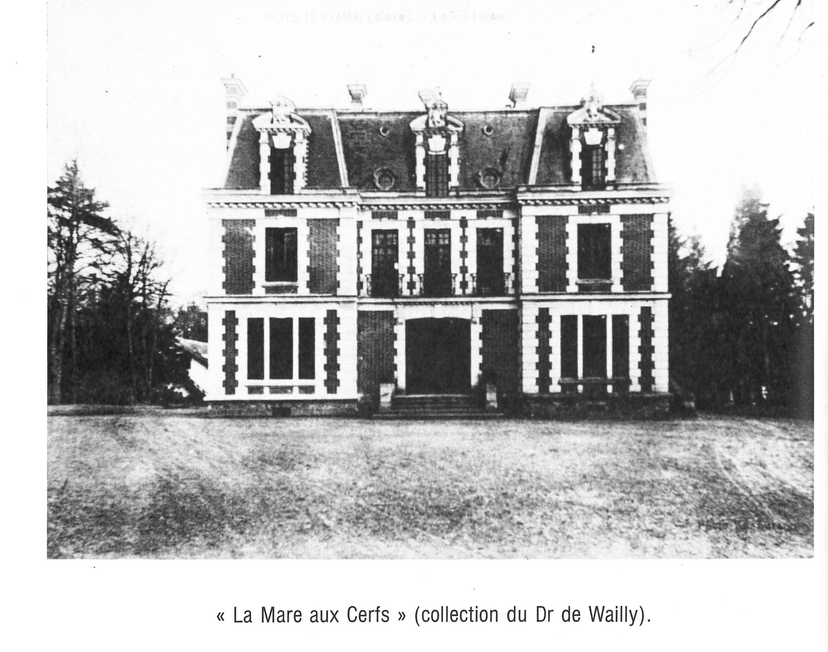 Château dit de la Mare aux Cerfs, à Bois-Jérôme-Saint-Ouen, dans l'Eure, demeure du docteur vétérinaire Alexandre Liautard acquise en 1911. et son lieu de décès en 1918